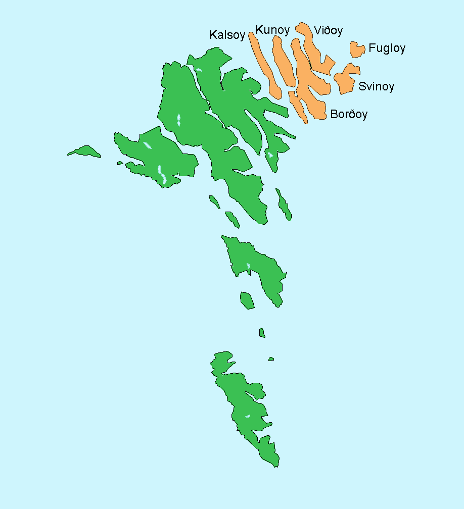 Norderøerne på Færøerne Tegning: Arne List